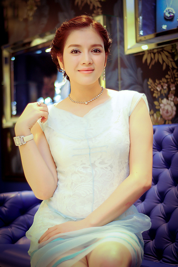 Lý Nhã Kỳ Bim Nguyễn Photos Model: Lý Nhã Kỳ Photo by Bim Nguyễn